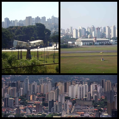 Montagem de fotos do distrito de Santana, São Paulo, Brasil